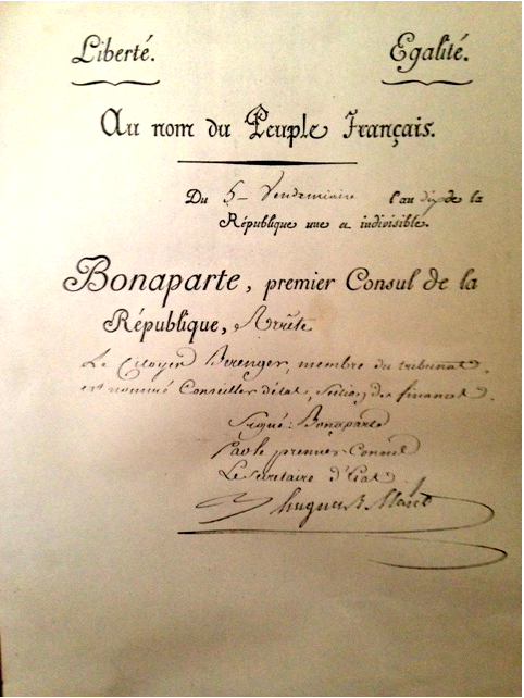 Nomination par Napoléon Bonaparte, Premier Consul de Jean Bérenger (1767-1850) au Conseil d'Etat